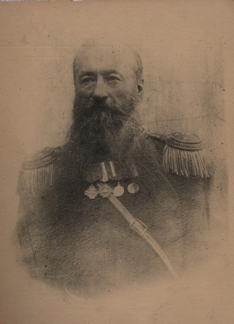 Архангельский Сергей Глебович, подполковник 9-го Стрелкового полка